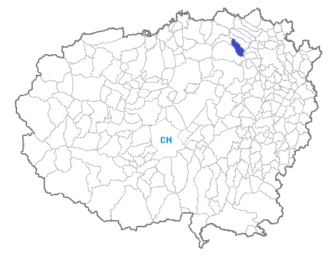 posizione del comune in provincia di Cuneo